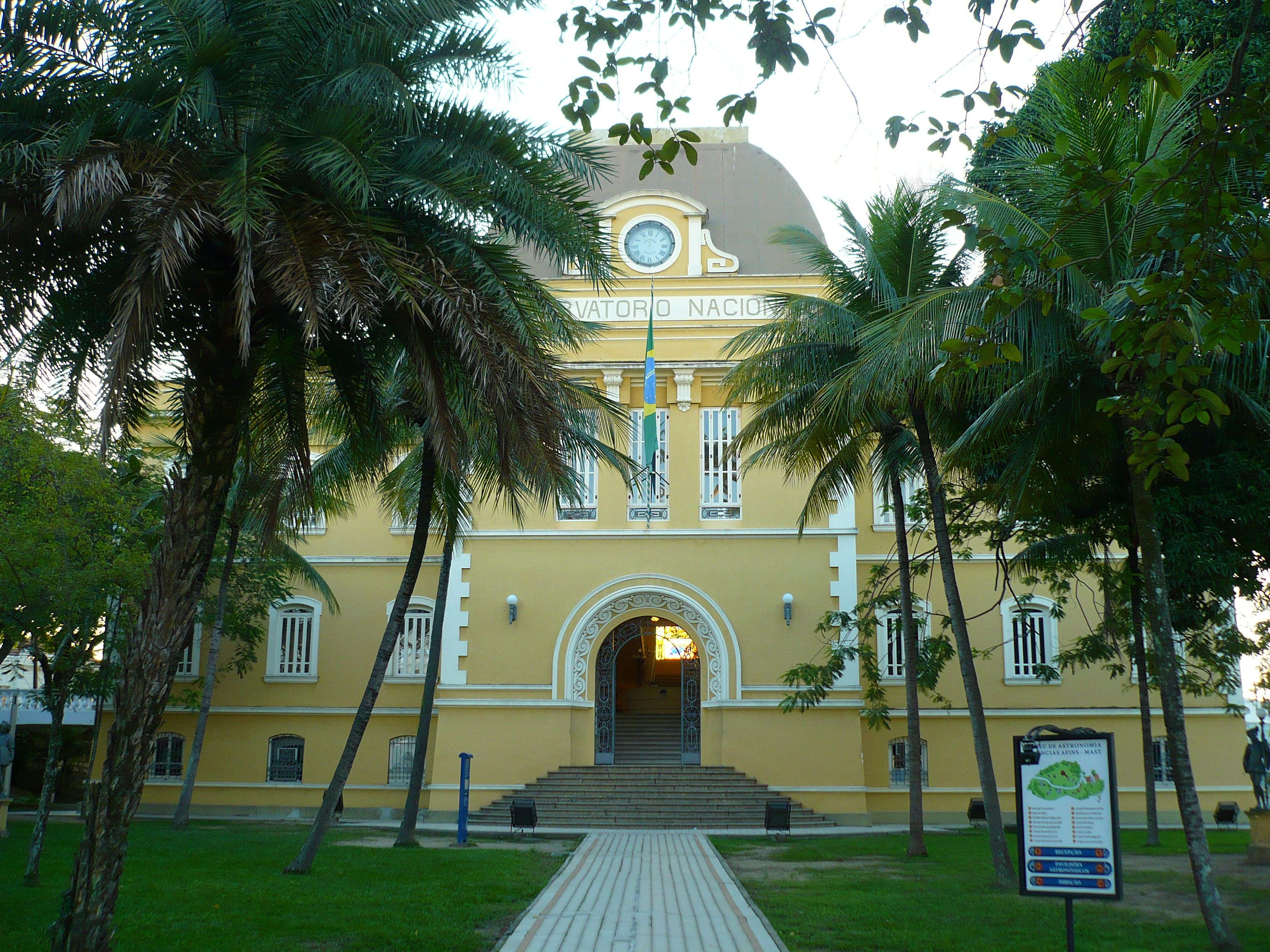 Museu de Astronomia e Ciências Afins, bairro de São Cristóvão, município e estado do Rio de Janeiro, Brasil: fachada do antigo prédio do Observatório Nacional.